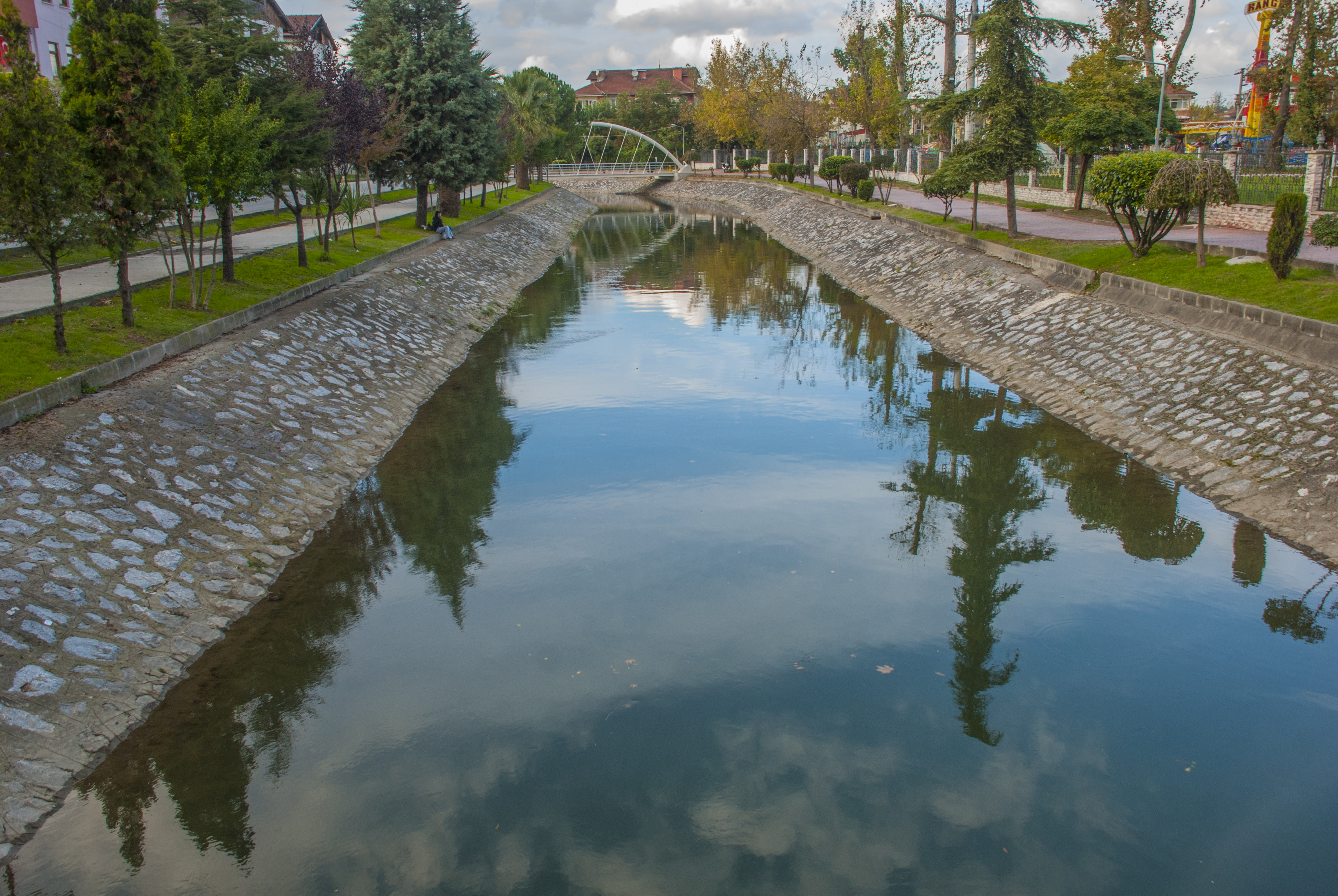 Adapazarı Nikah Salonu yakınında Çark Suyu.